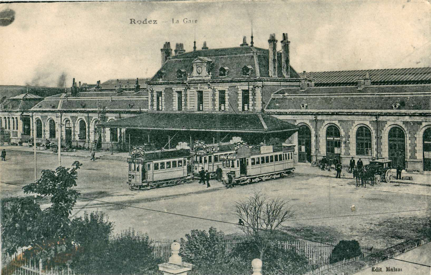 Carte postale ancienne éditée par Malzac : RODEZ - La Gare